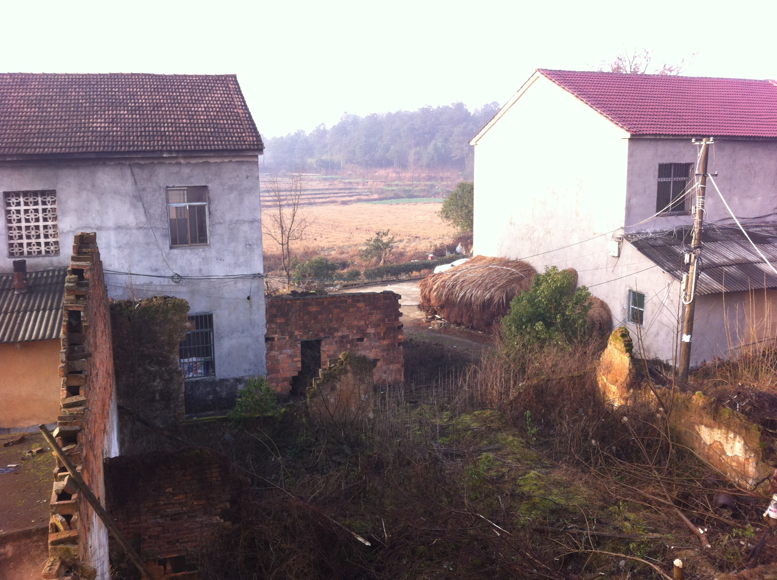 中文（中国大陆）: 湖北省黄梅县停前镇一角